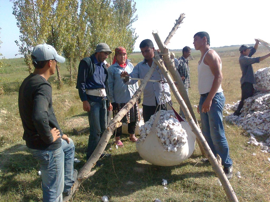 Взвешивание и документирование всего веса собранного хлопка сырца, Бука, Ташкентский область, Узбекистан